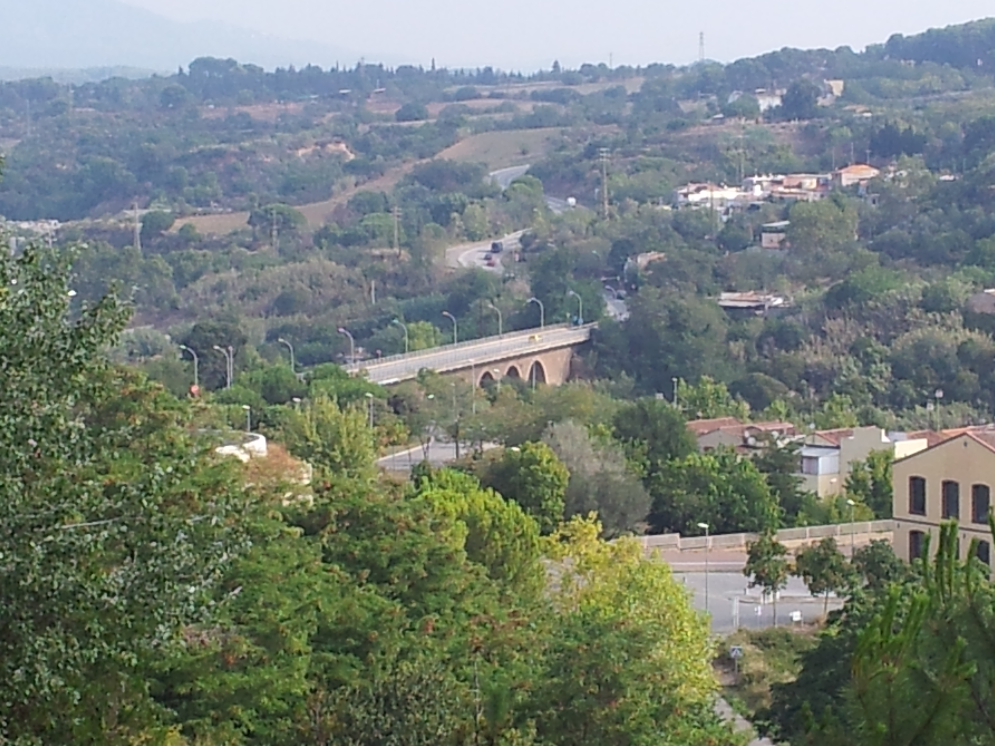 Sabadell